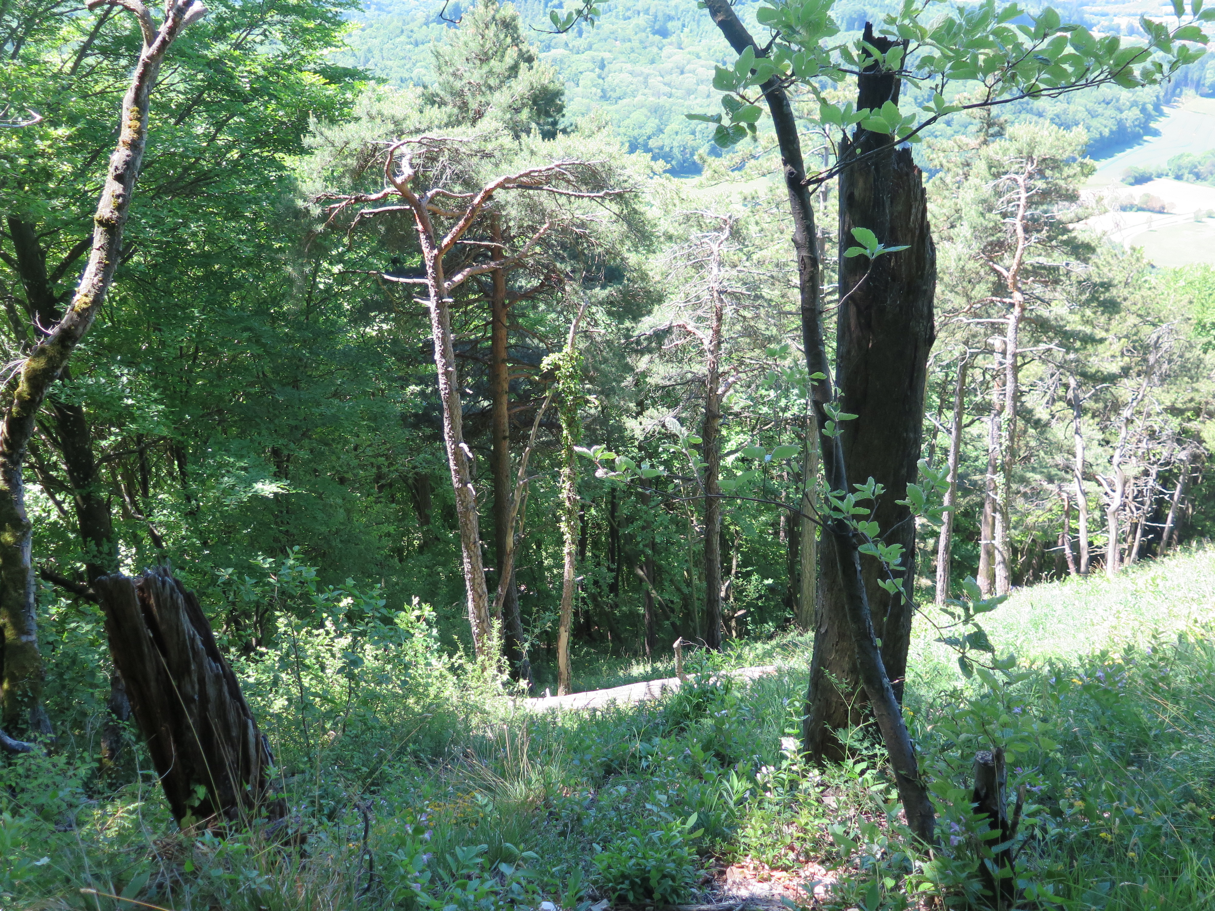 Naturschutzgebiet „Küssaberg“ (NSG 3.038)